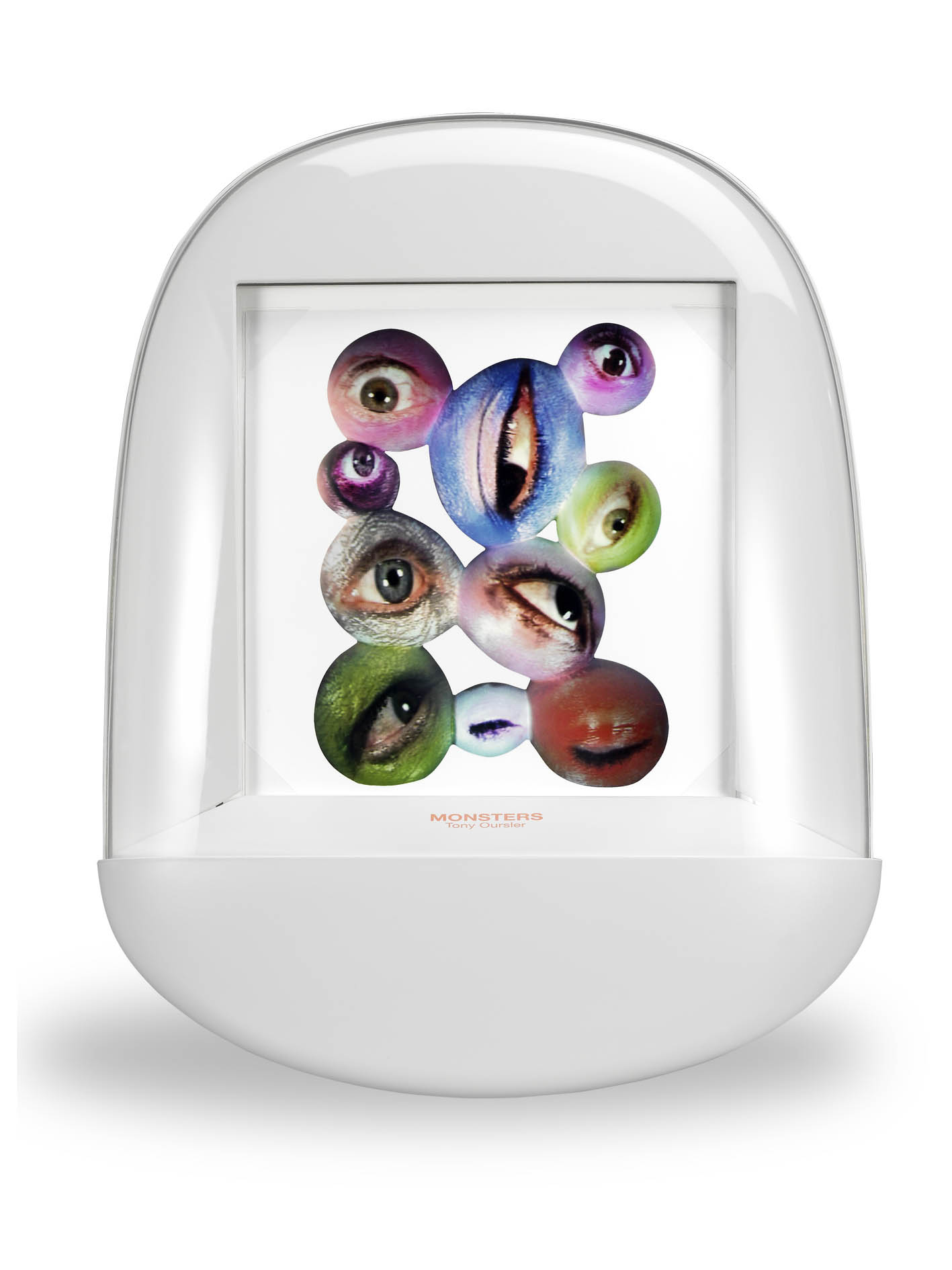 Livre d'artistes édité par les éditions Take5